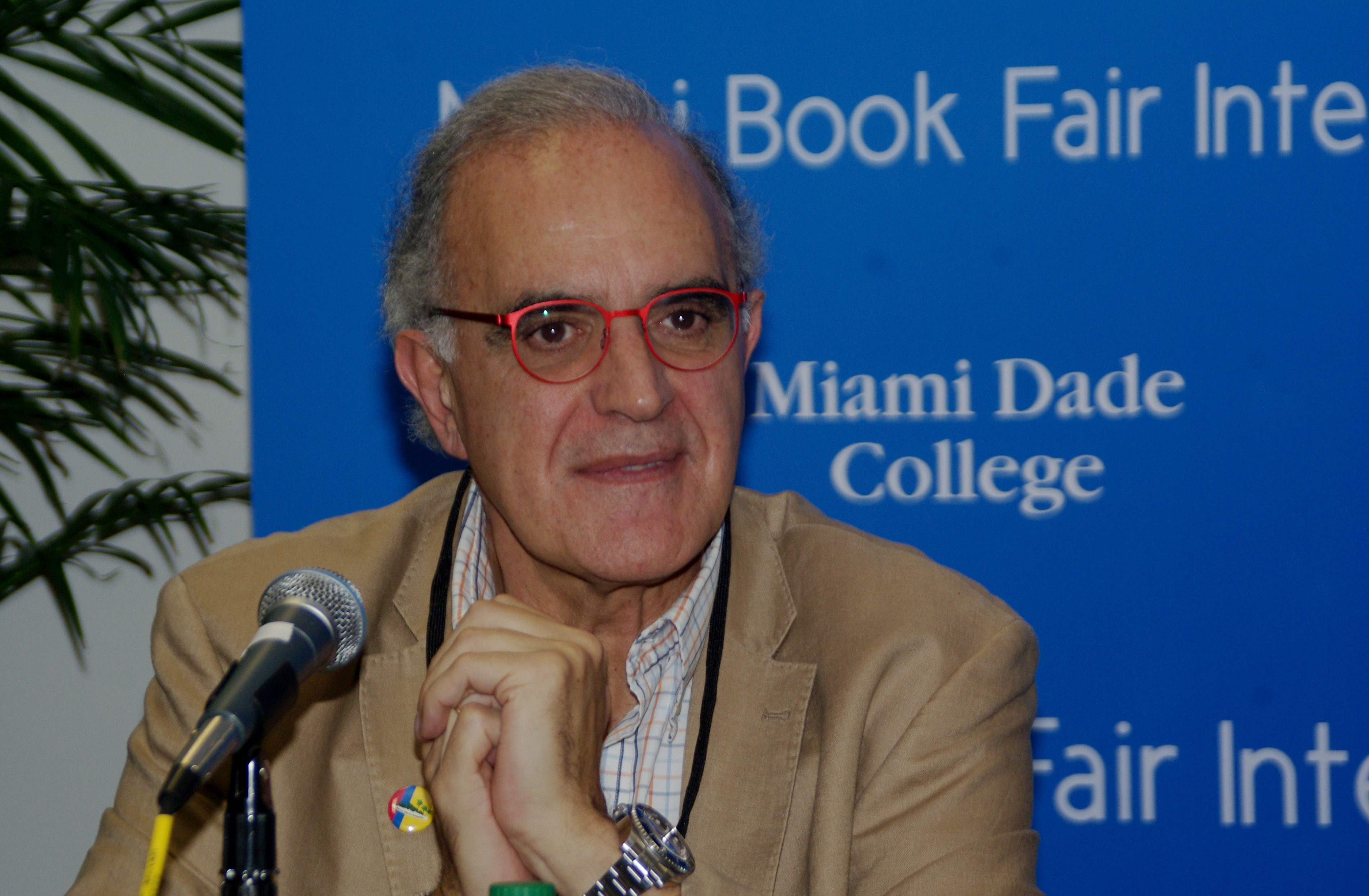 El escritor español Fermín Goñi en la Feria Internacional del Libro de Miami, 2014